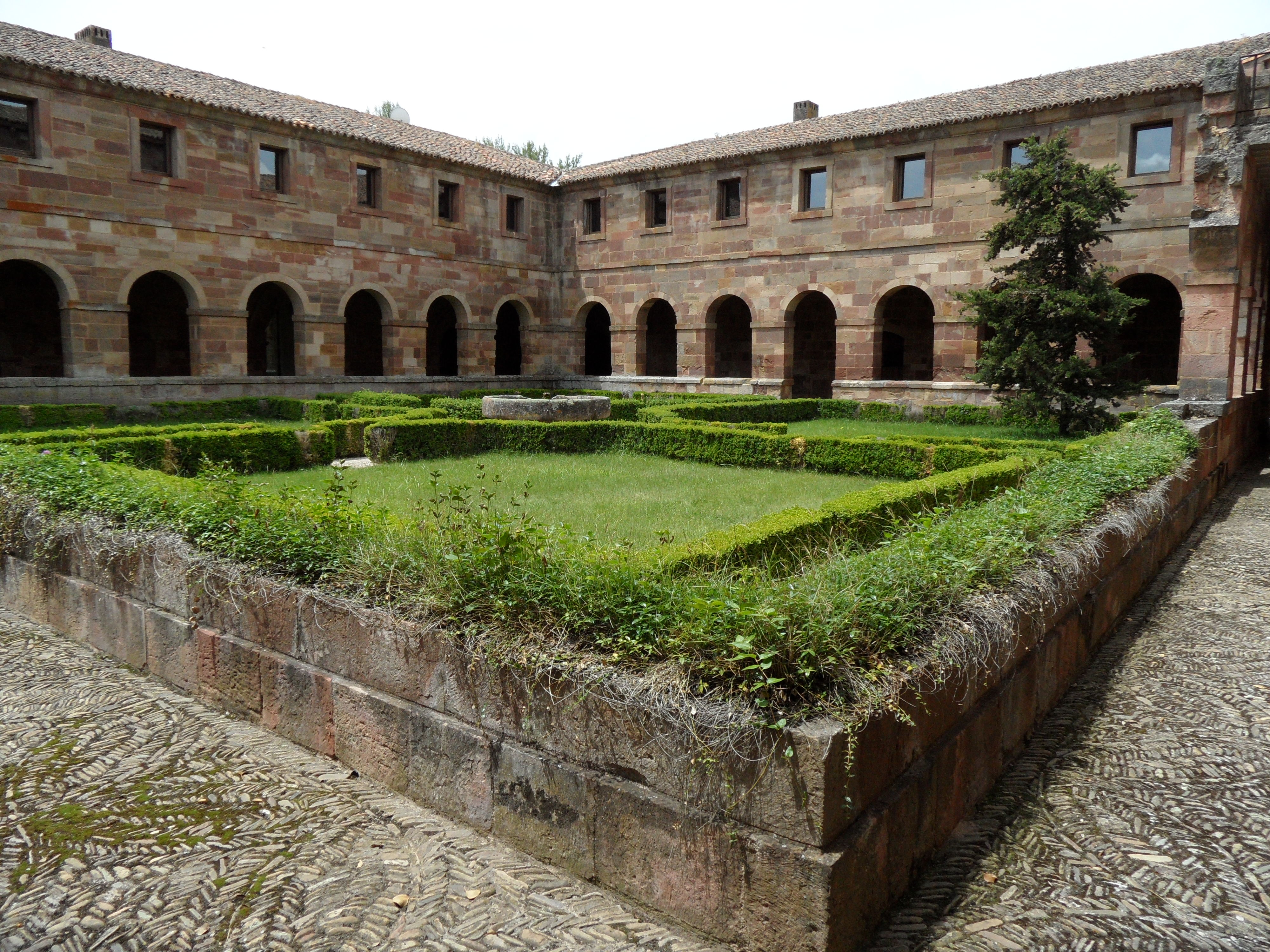 Monasterio Santa Maria de Bujedo de Juarros. Este Monasterio es de propiedad privada, y ha sido restaurado siendo galardonado por la Asociación Europa Nostra en el año 1981